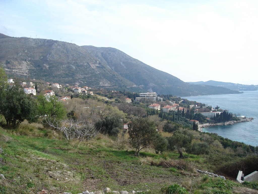 Plat - Župa dubrovačka